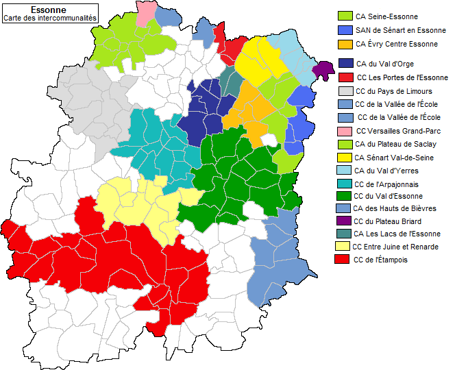 Carte des intercommunalités en Essonne en 2003.